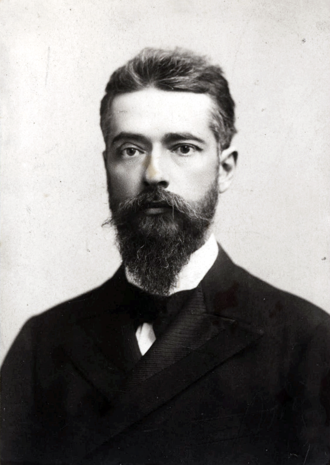 Federico Puga Borne [fotografía] Spencer y Cia.